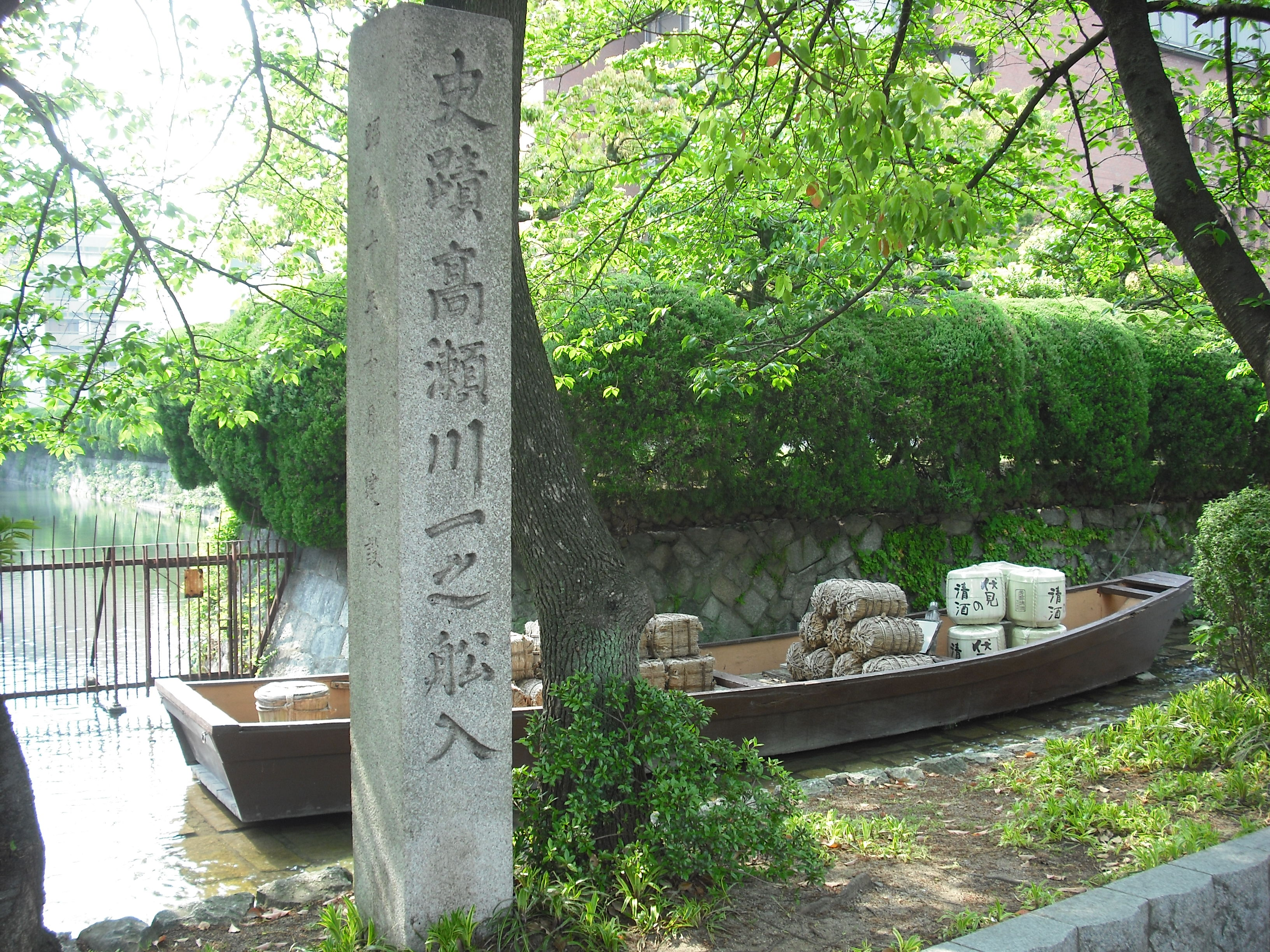 高瀬川 一之舟入跡石碑